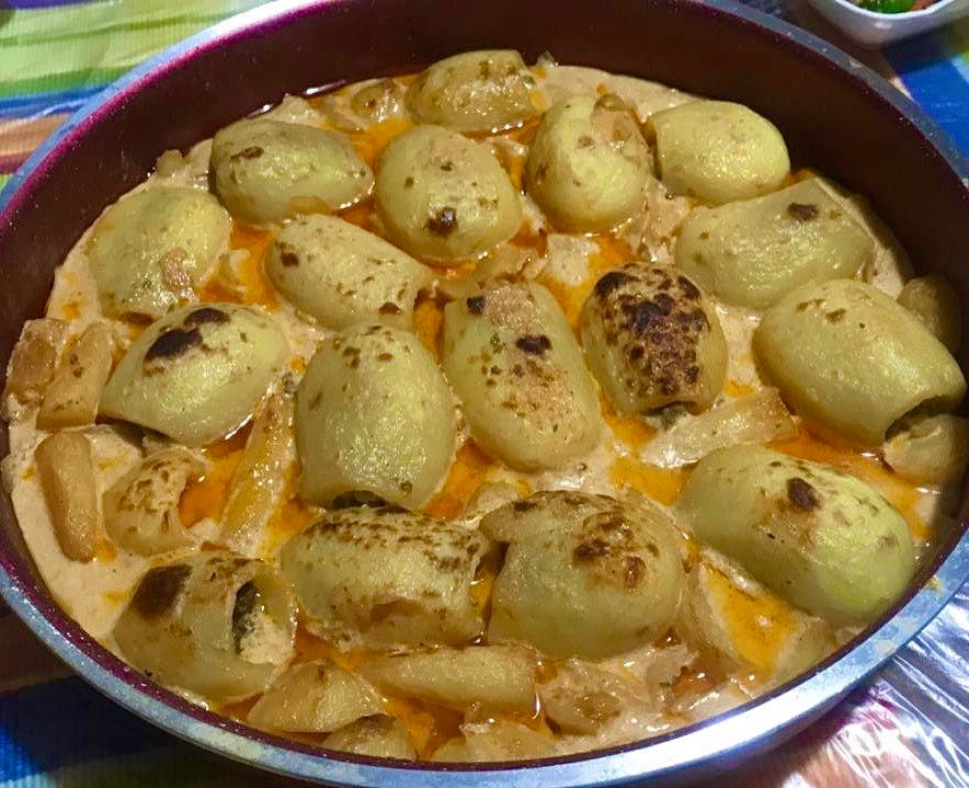 صورة للبطاطا المحشية (أحد الأكلات الشامية)التي يتم تحضيرها عن طريق البطاطاواللحم المفروم واللبن، مع إضافة الزيت والبهارات